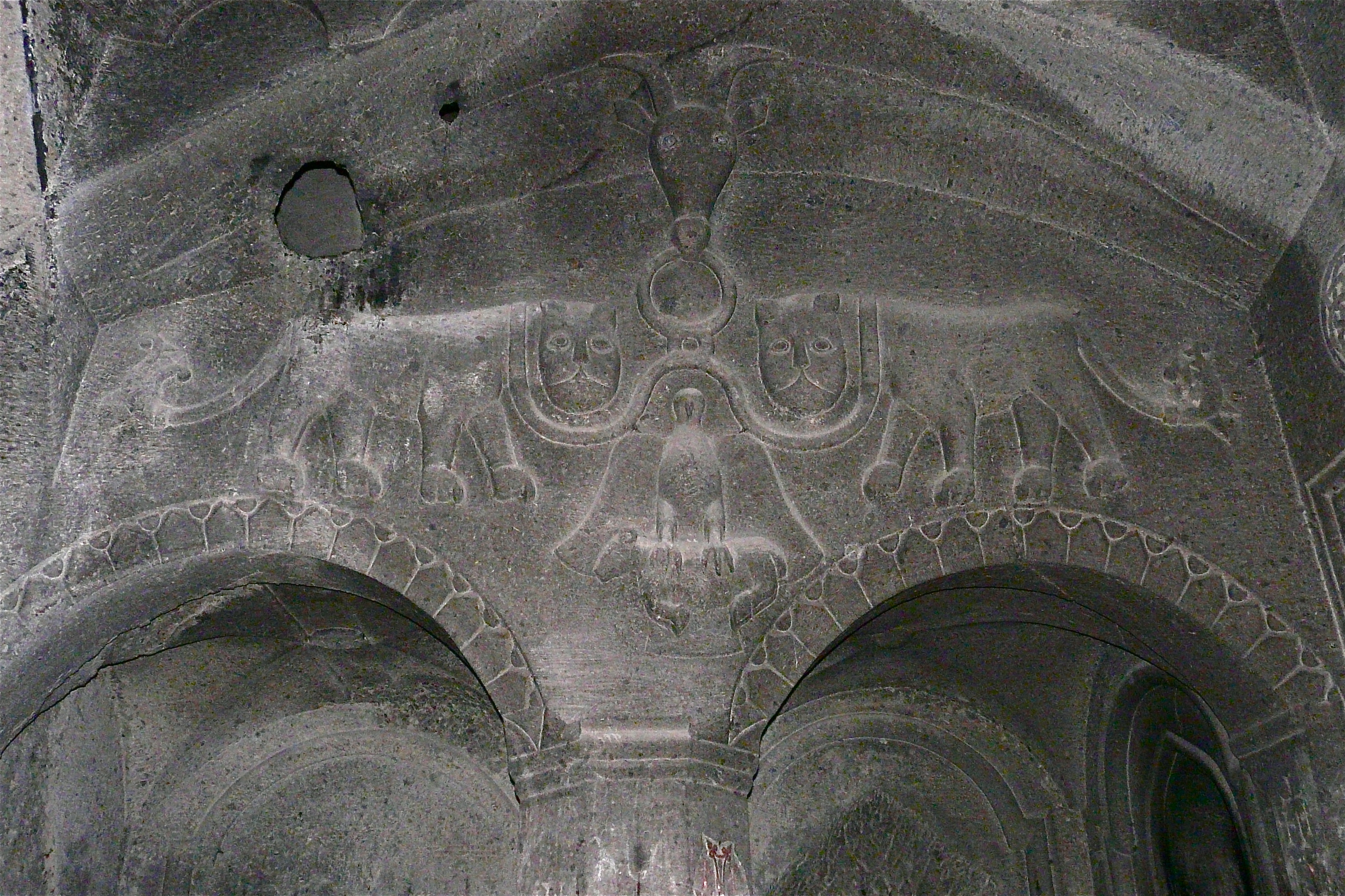 Holenklooster op het einde van de Aziatschlucht, en in de 8ste en 10de eeuw verwoest door Arabieren. In de 13de eeuw, onder de Zakharjanen, werd de hoofdkerk gebouwd. De Zakharjanen hebben Armenië van de Seldsjoeken gevrijwaard. Daarna werden de holen tot kerken omgevormd. Het kloostercomplex bestaat uit wooncellen voor de monniken, de kerk Moeder Gods, holenkapellen en profane gebouwen. zie ook